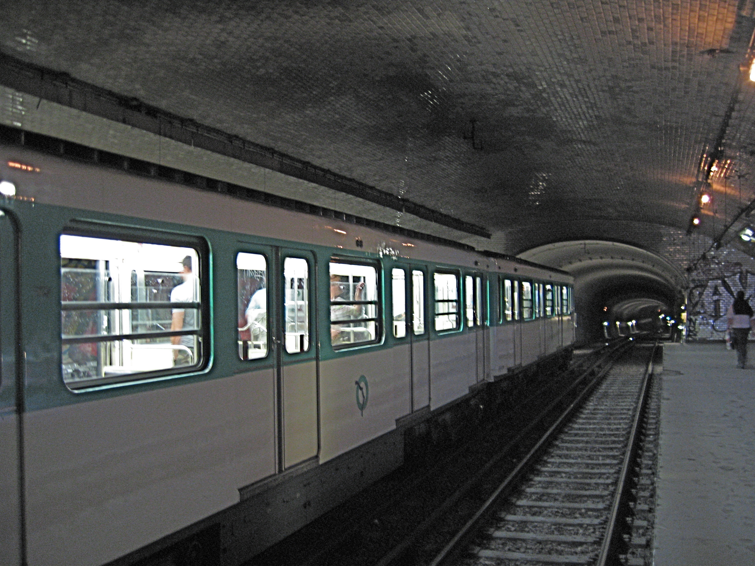 Journées du patrimoine RATP 16-17/09/2006. Croix-Rouge, station fantôme.